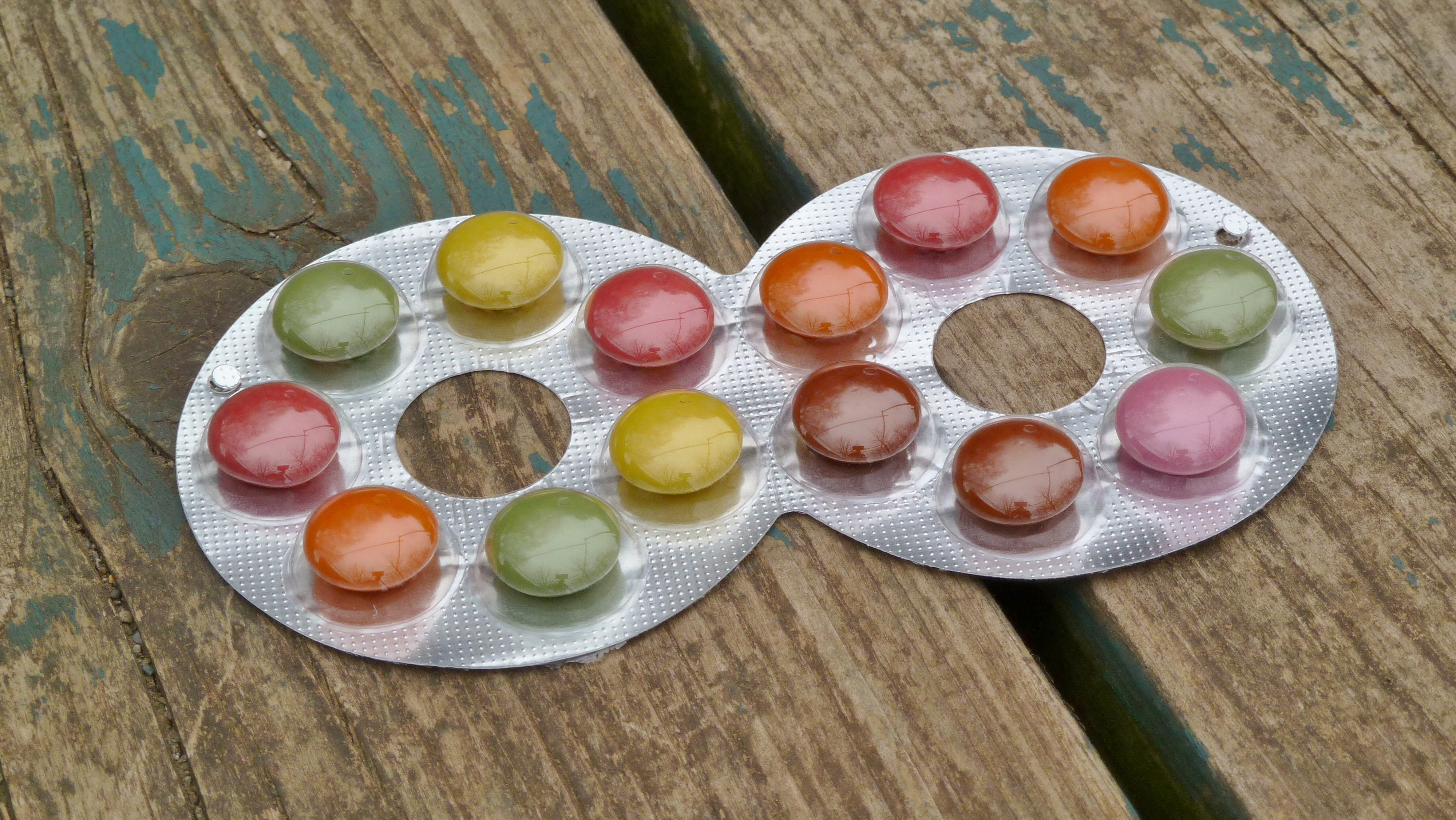 フルタ製菓が販売するチョコレート菓子「ハイエイトチョコ」